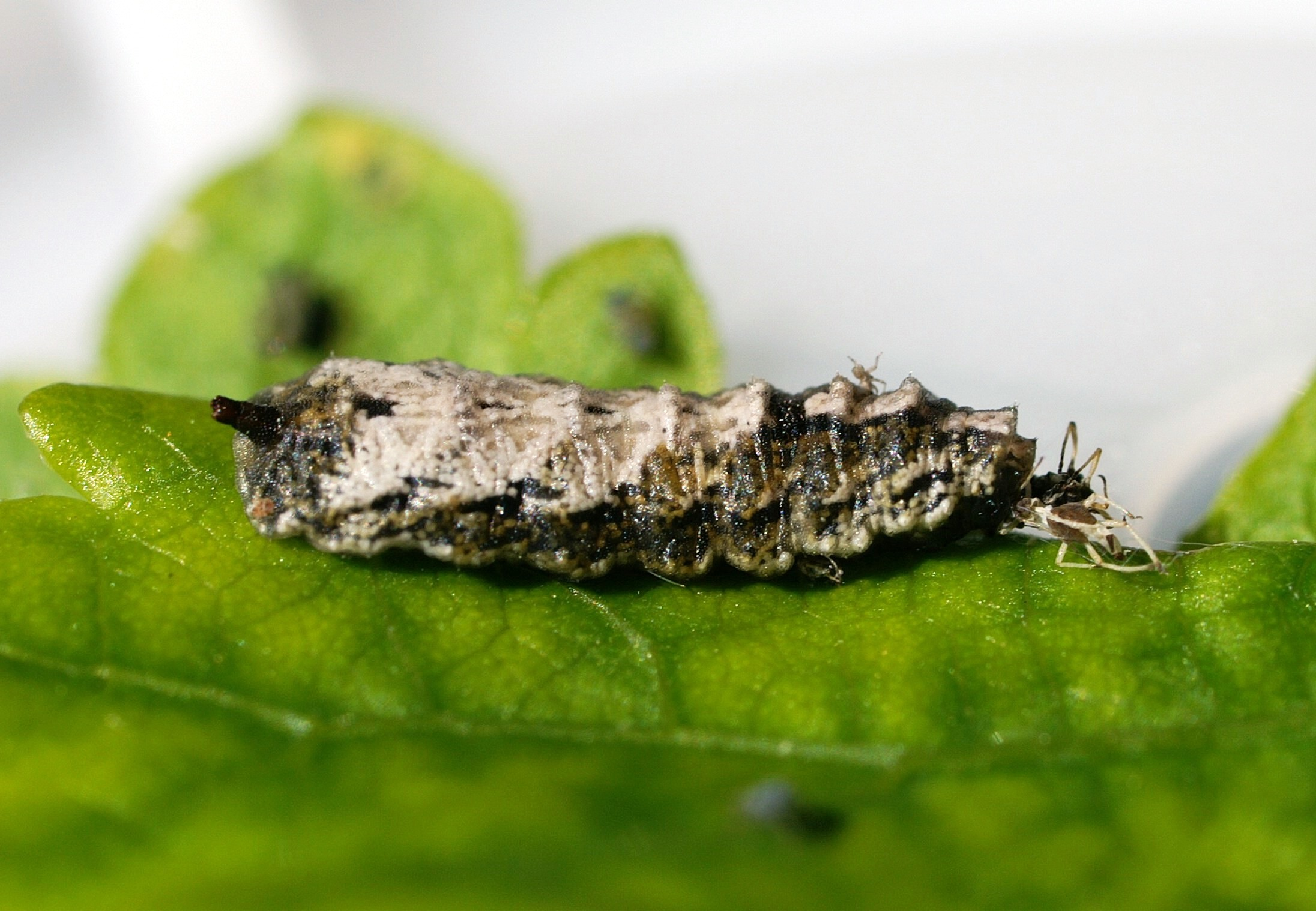 eine ca. 8mm lange Primärlarve der Schwebfliege (Syrphidae) nach dem Verzehr einer Blattlaus (Aphidoidea). Gefunden auf einem Straucheibischblatt.